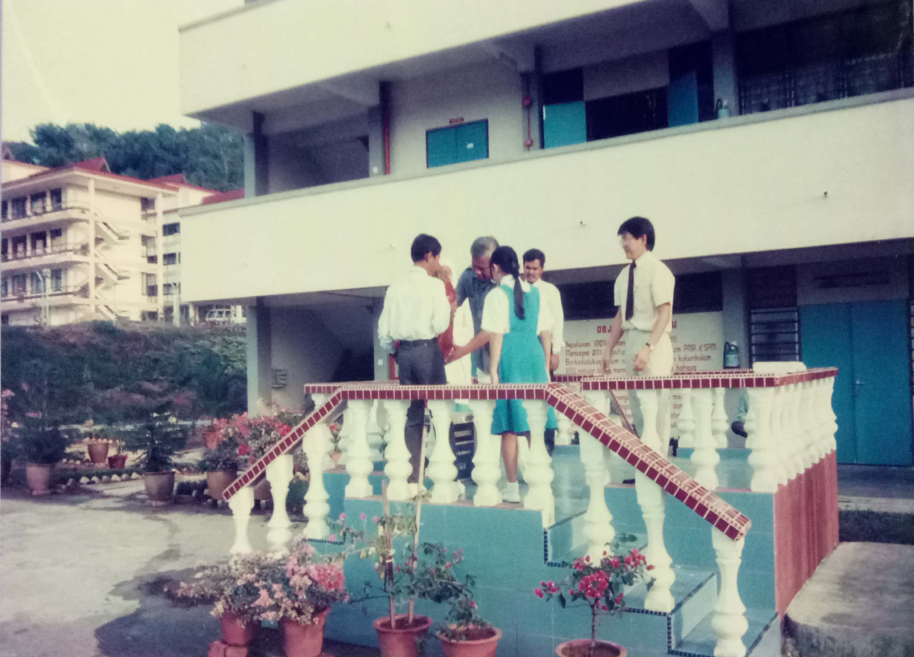 Astaka Sekolah tahun 90an